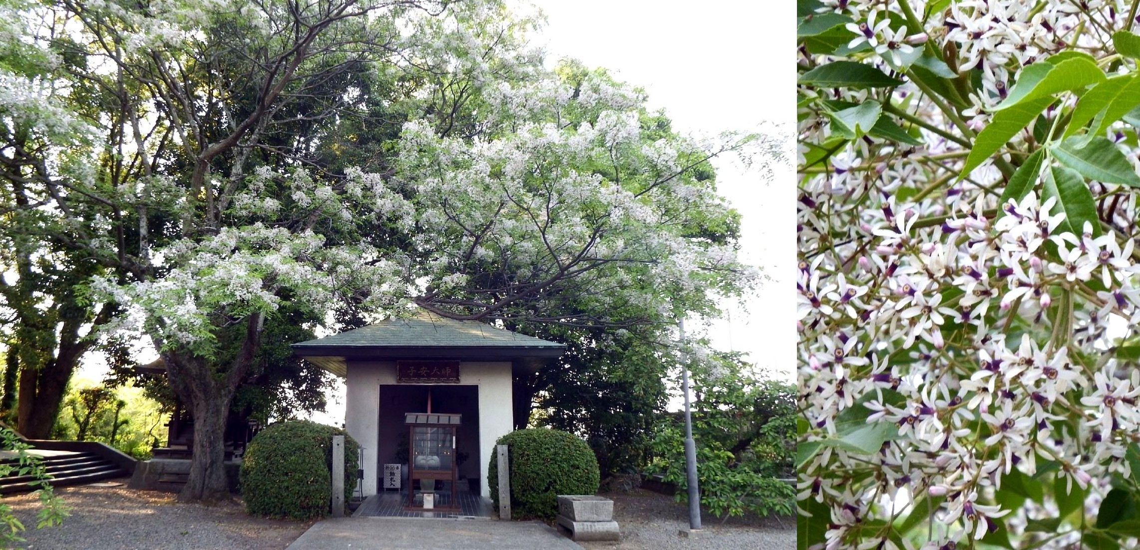 香園寺のせんだん